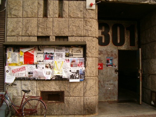 overtoom 301, amsterdam